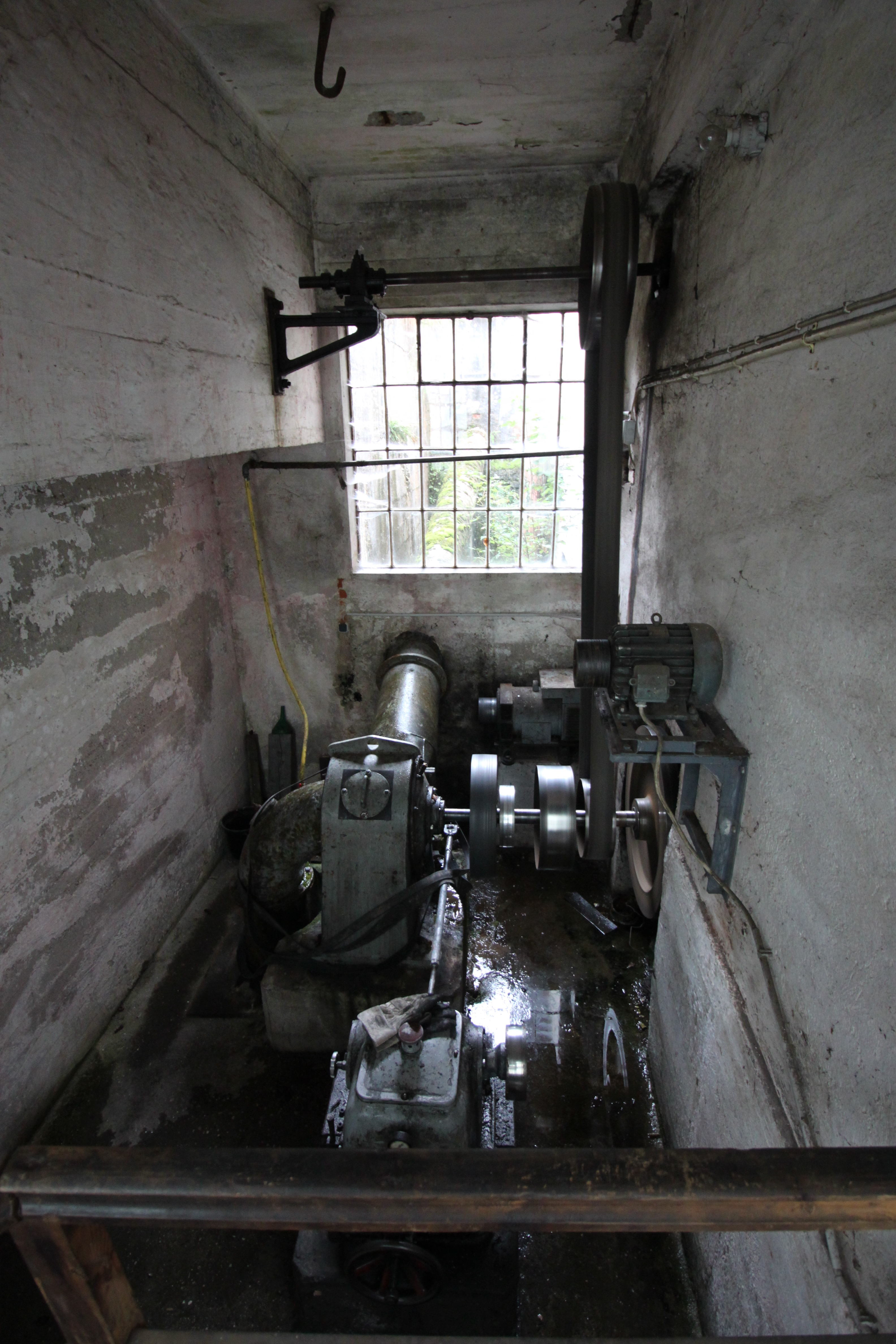 Feitelwerkstätte der Feitelerzeugung Löschenkohl, Turbinenhaus